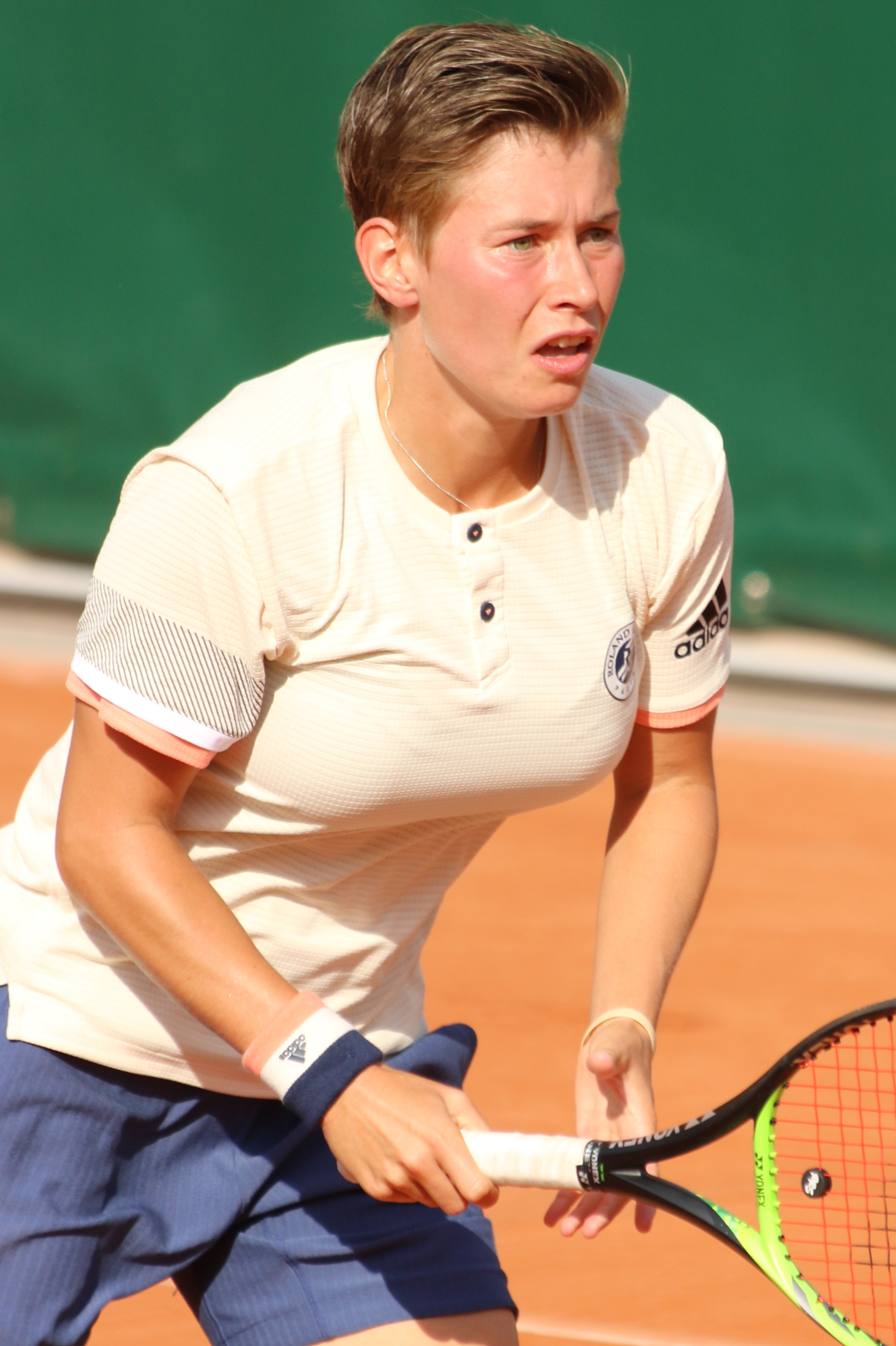 Schuurs RG18 (11)